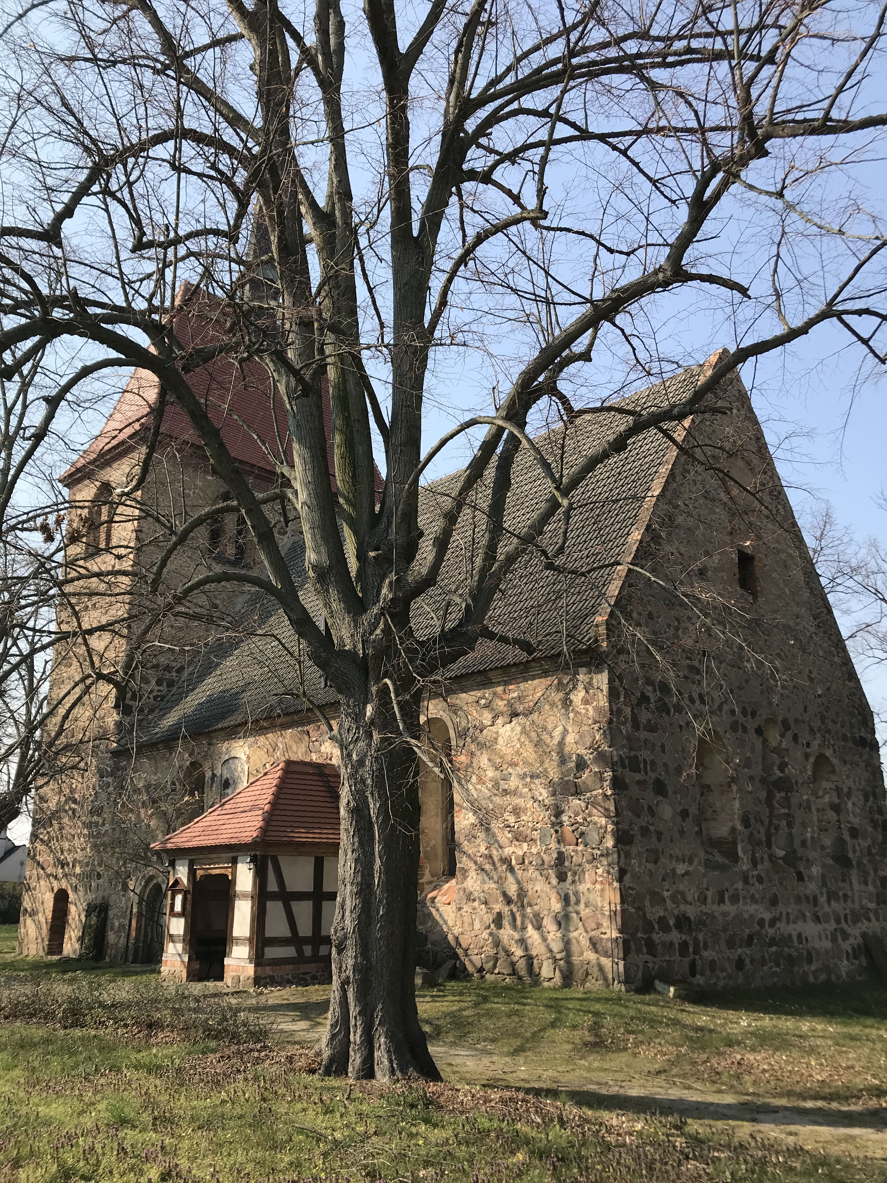 Die Dorfkirche Gießmannsdorf ist eine frühgotische Saalkirche in Gießmannsdorf, einem Ortsteil der Stadt Luckau im Landkreis Dahme-Spreewald im Land Brandenburg. Im Innern steht unter anderem ein spätklassizistischer Kanzelaltar aus der Zeit um 1865.